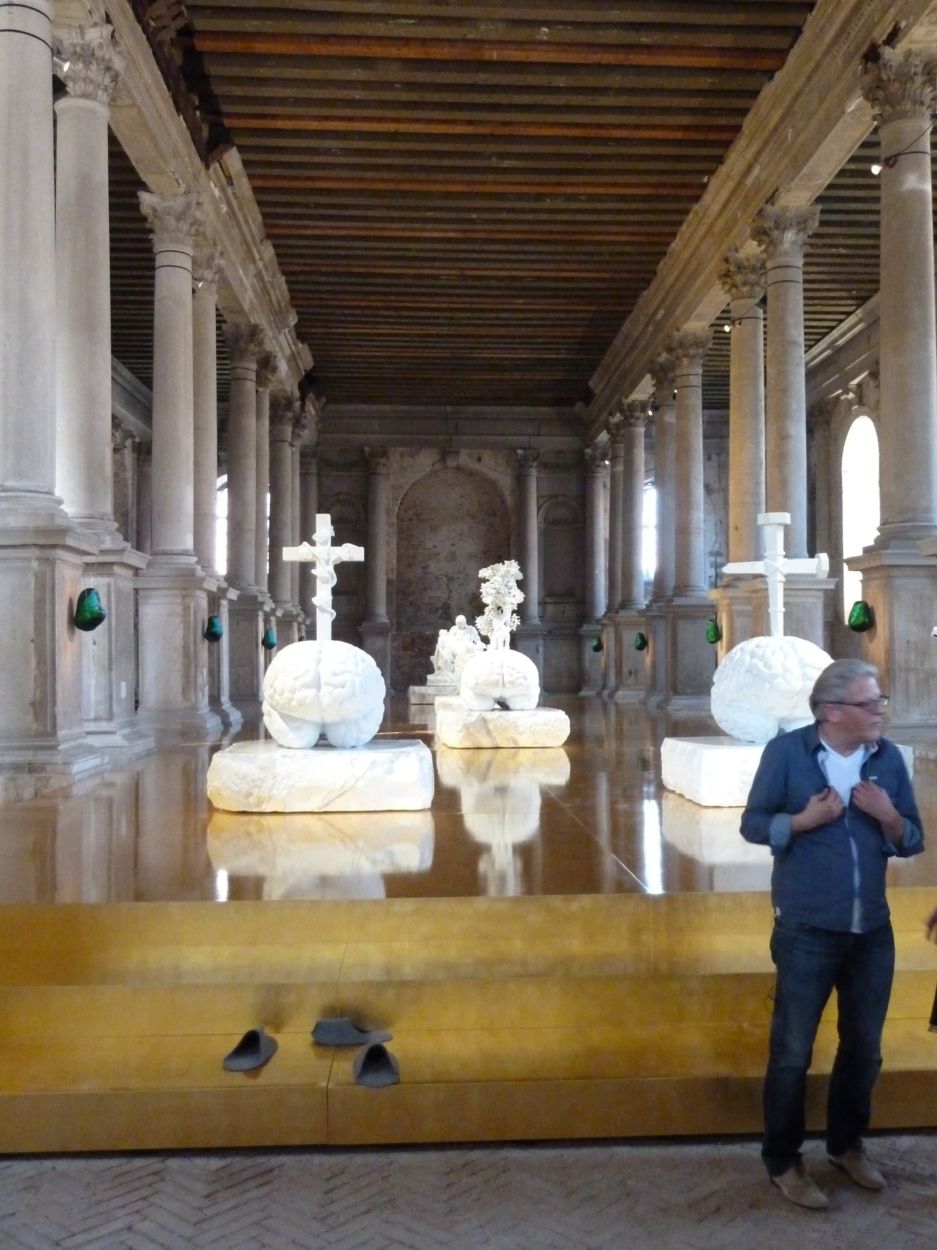 Jan Fabre à la biennale de Venise